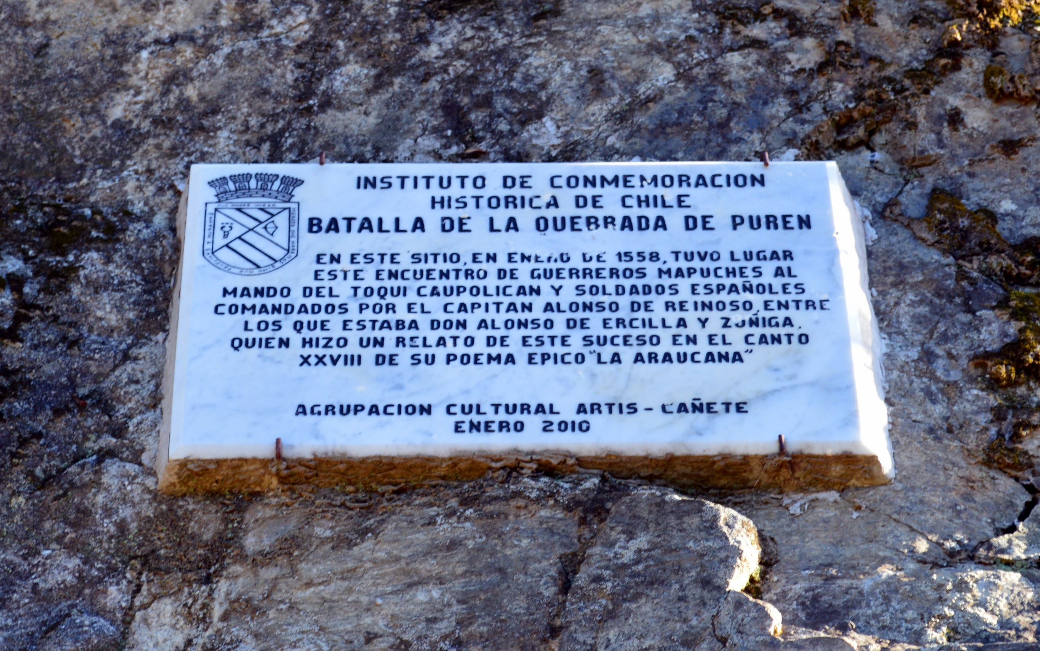 Hito histórico Batalla de la Quebrada de Purén.